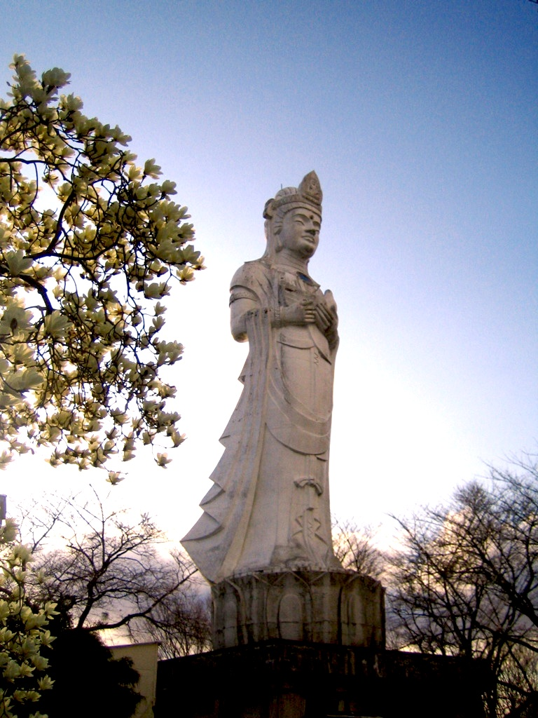 Heiwakannon in Funaoka castle park.